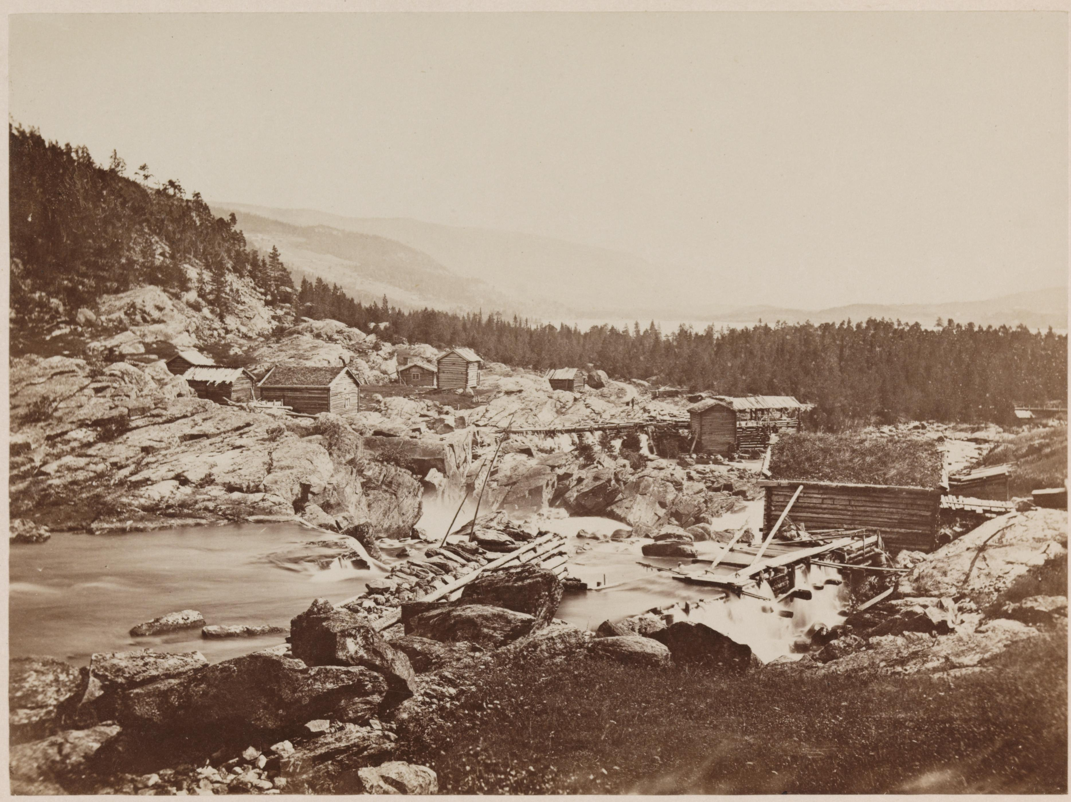 Bildet er hentet fra Nasjonalbibliotekets bildesamling. Anmerkninger til bildet var: Del av serien "Norske Prospecter" Neselvi, Nord-Aurdal, Oppland